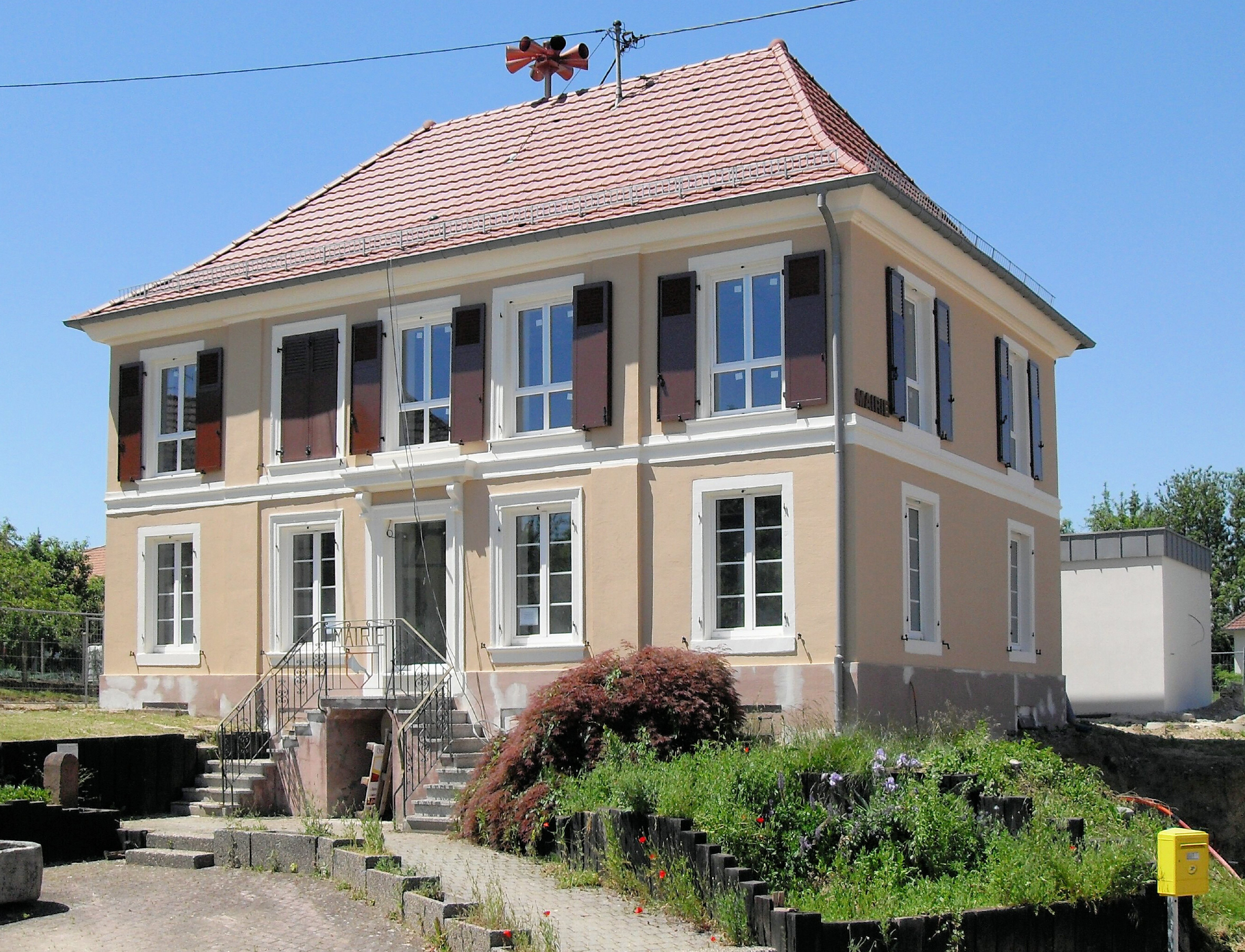 La mairie d'Altenach